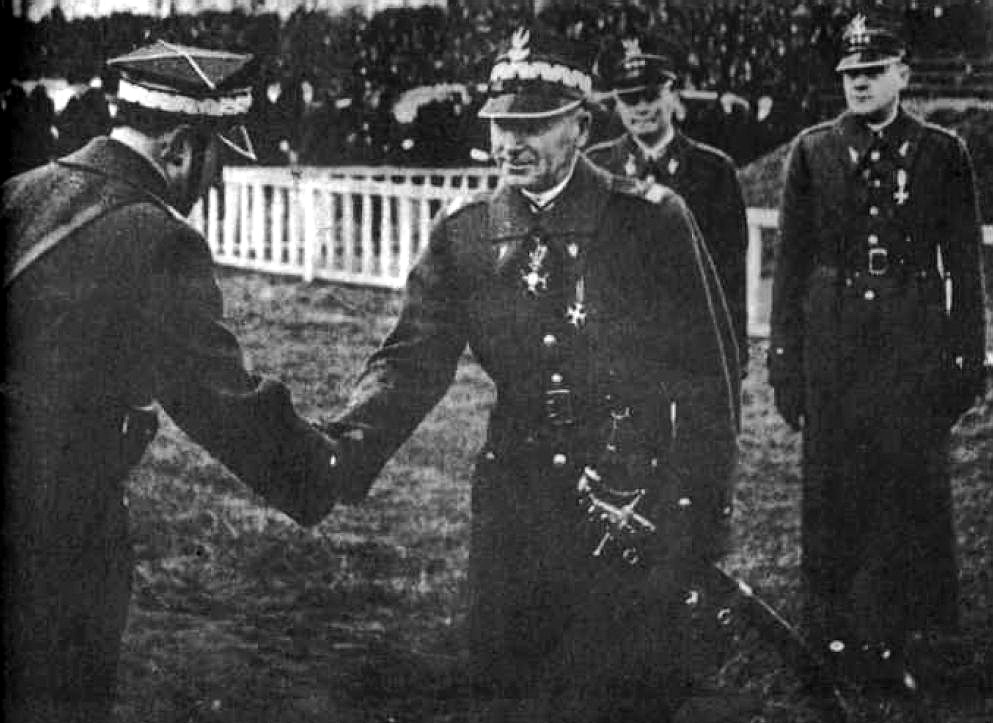 Wręczenie Rydzowi-Śmigłemu pamiątkowej szabli jako daru armii polskiej przez T. Kasprzyckiego 11 listopada 1936 r. na Polu Mokotowskim.